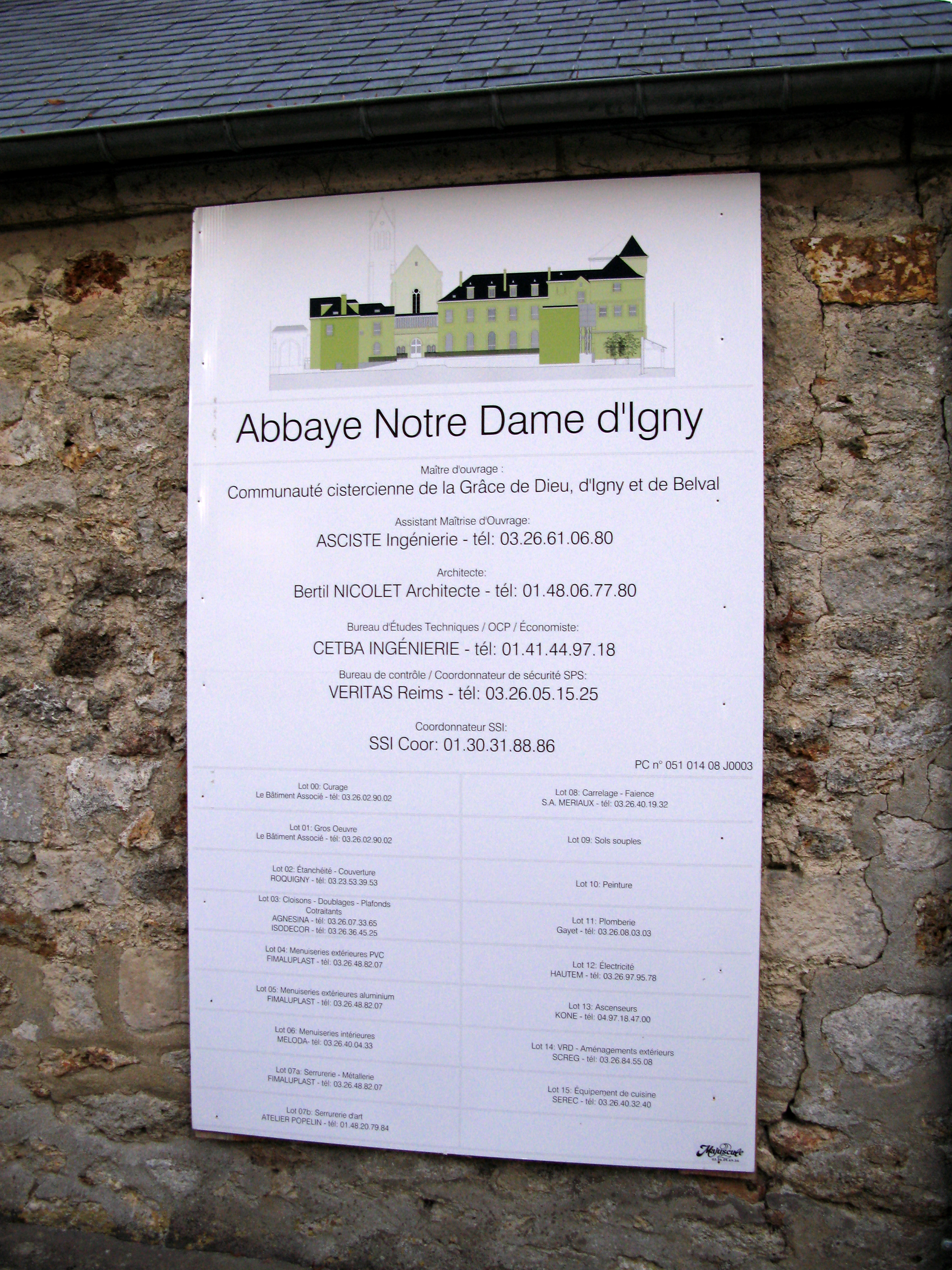 Arcis-le-Ponsart (Marne, France) - Le panneau annonçant les travaux à l'entrée de l'Abbaye Notre-Dame d'Igny. . .